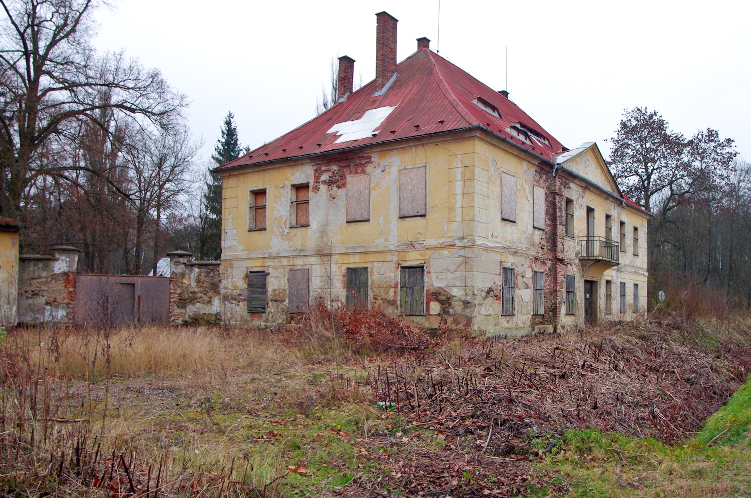 Zájezdní hostinec Spiegel (Arnoltov), při silnici na rozcestí k Arnoltovu 52, Arnoltov